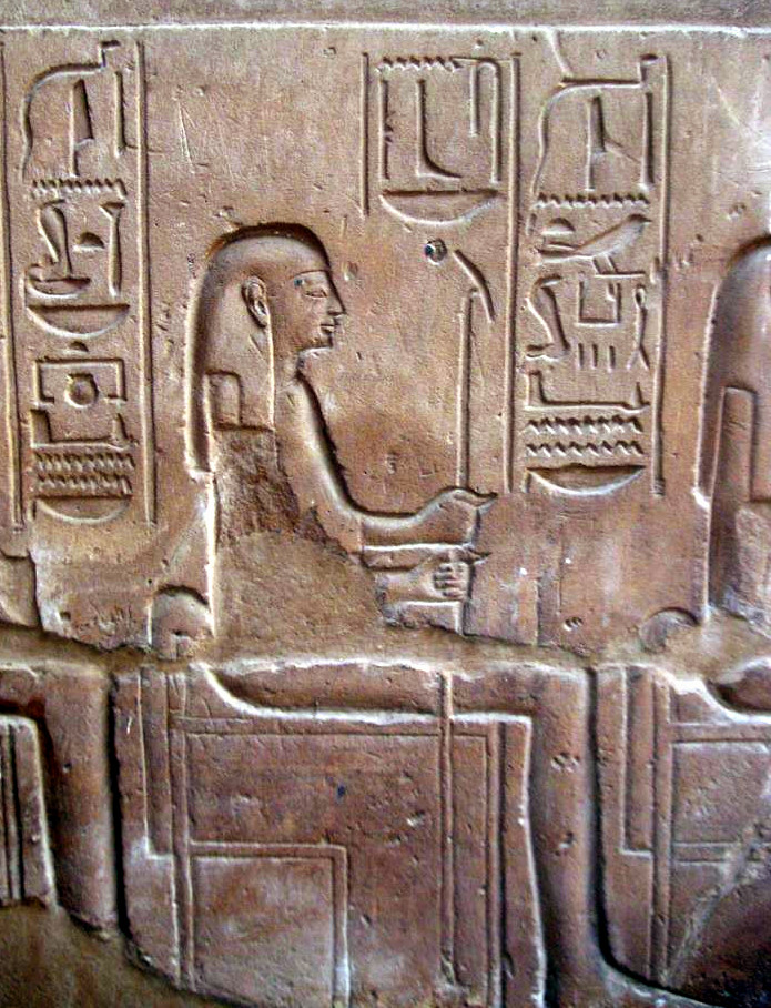 Relief représentant la déesse Ouret Hékaou - Temple de Louxor - Règne de Ramsès II - XIXe dynastie égyptienne